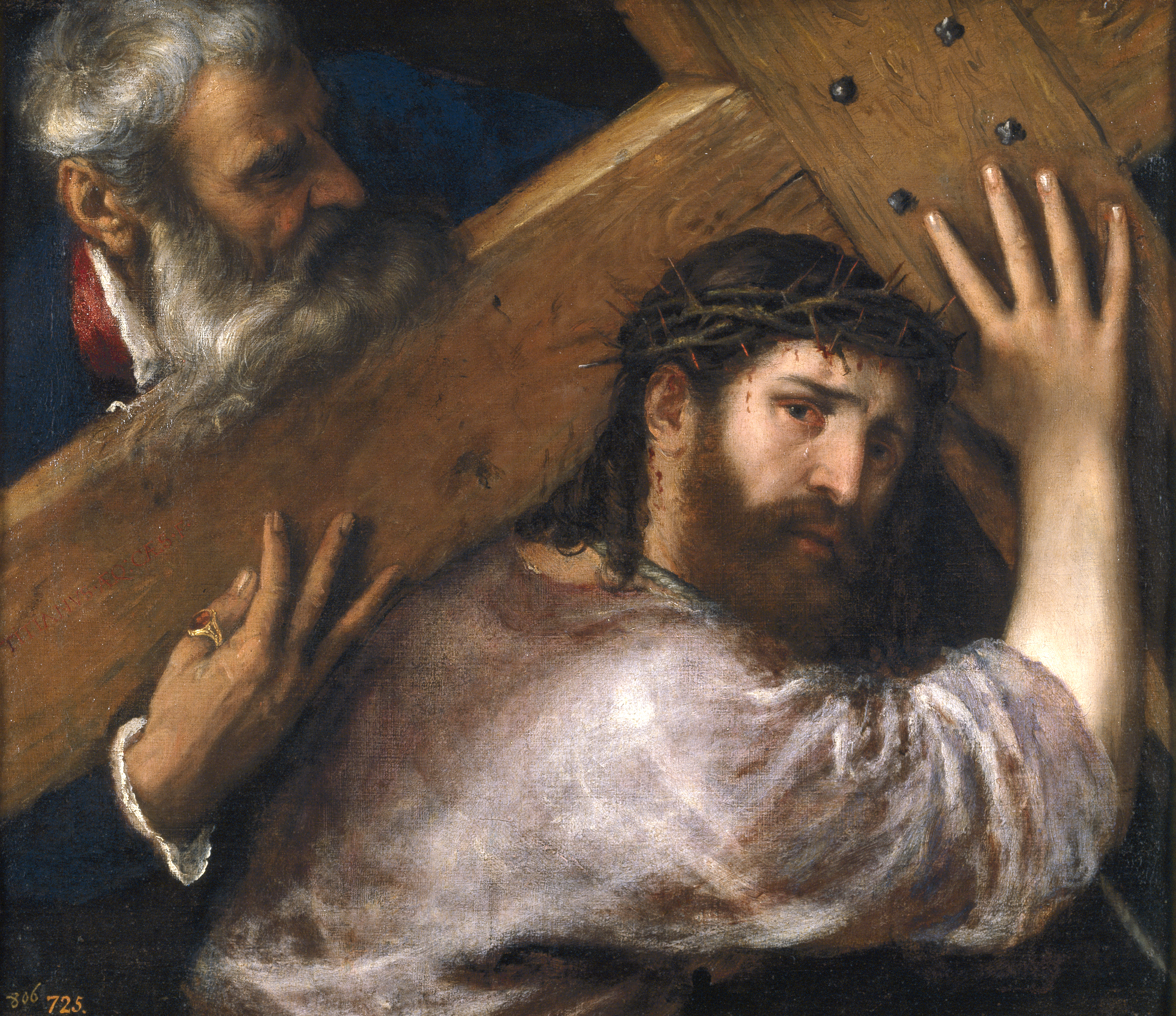 La obra representa a Jesucristo cargando con la cruz en la que sería crucificado y dirigiéndose hacia el monte Calvario.